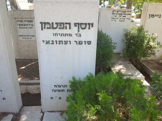 קברו של העיתונאי יוסף הפטמן בבית העלמין בנחלת יצחק צילום אלי אלון